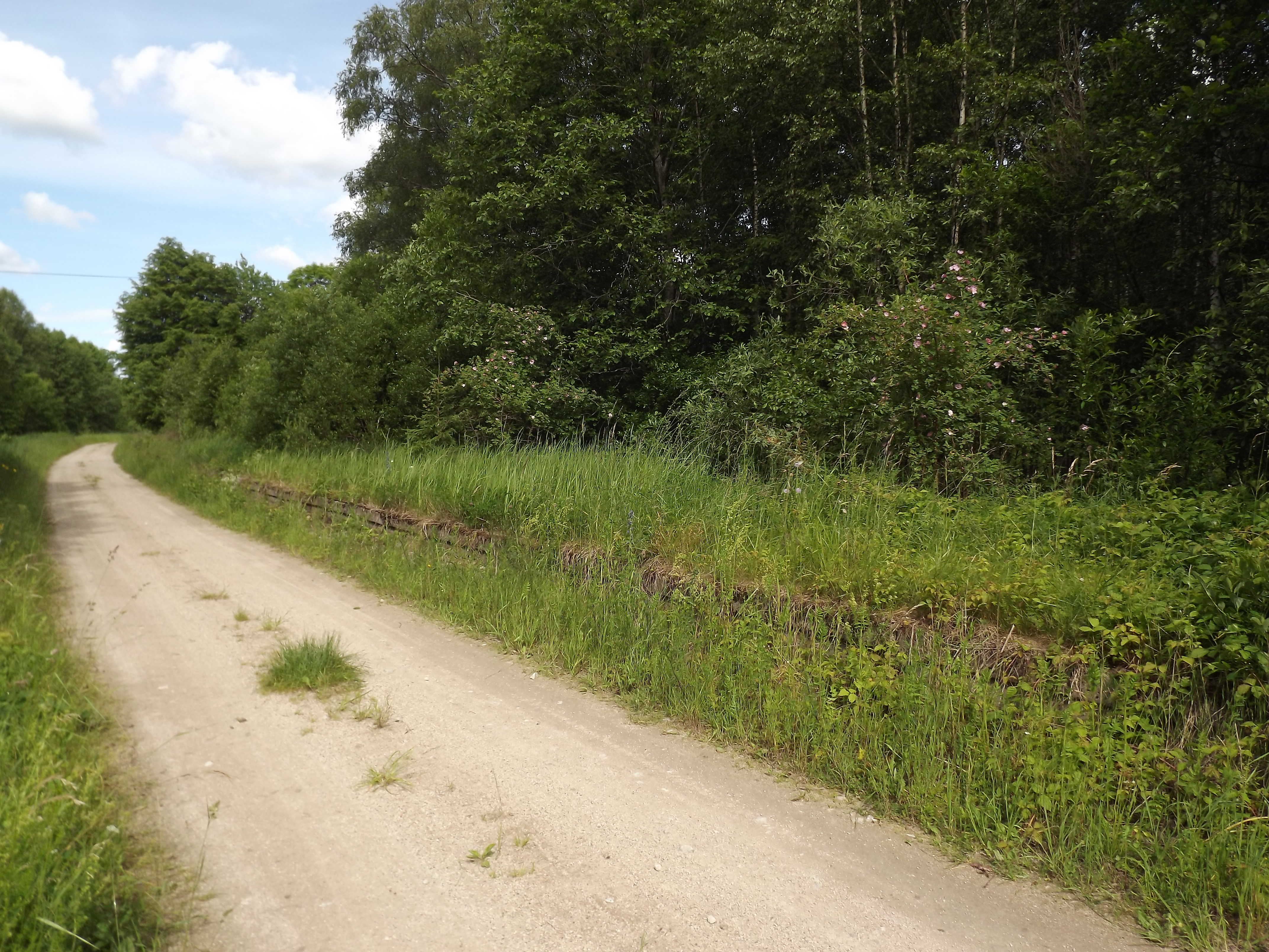 Endine Jaakna raudteepeatus.